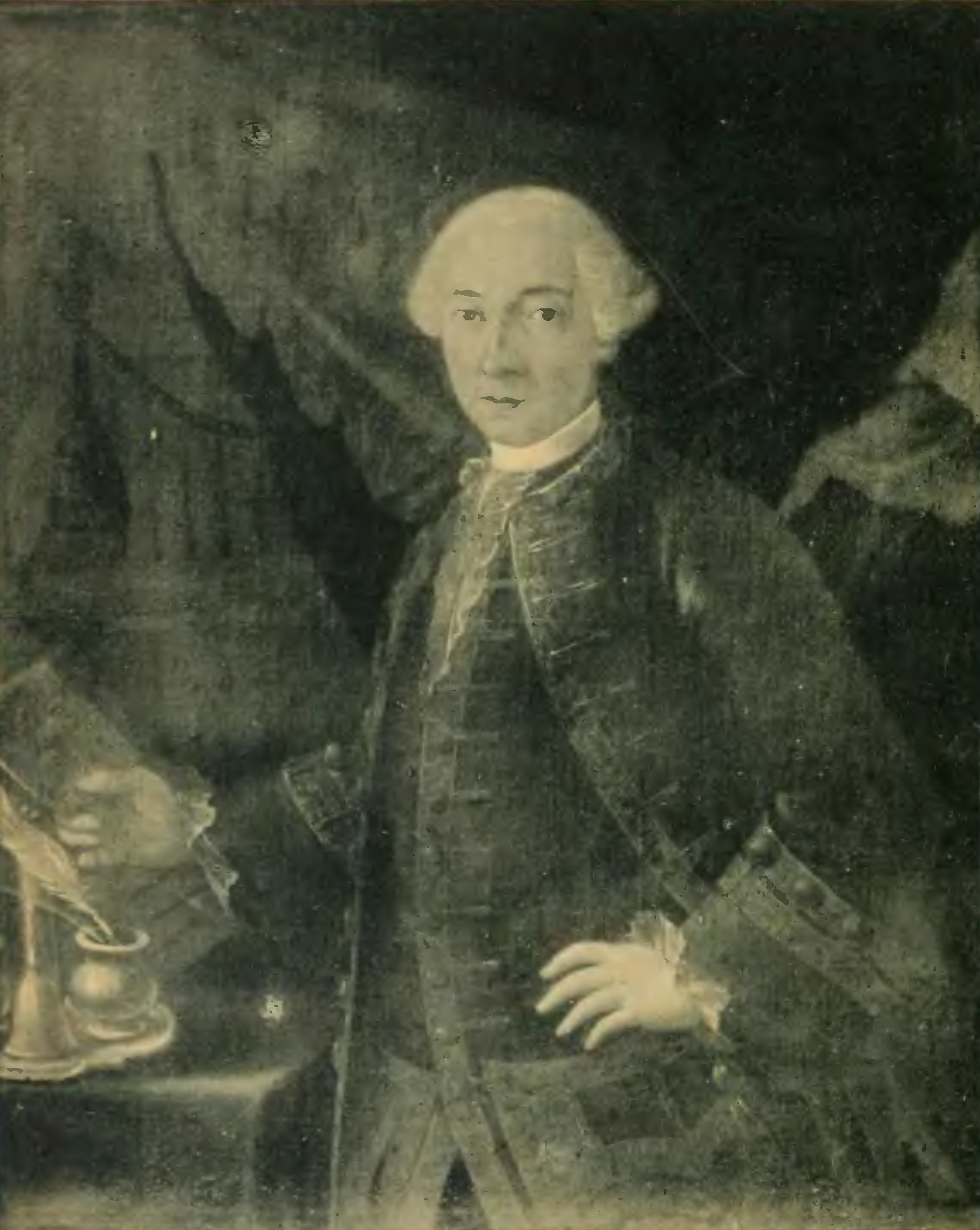 Don Ramón de la Cruz y sus obras; ensayo biográfico y bibliográfico por Cotarelo y Mori, Emilio, 1857-1936